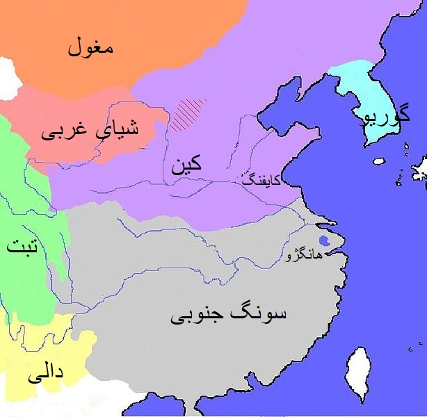 نقشه سونگ جنوبی